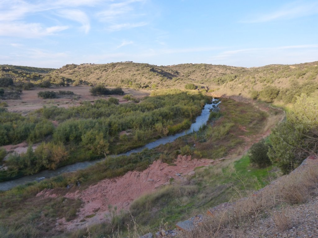 río Guadalmena